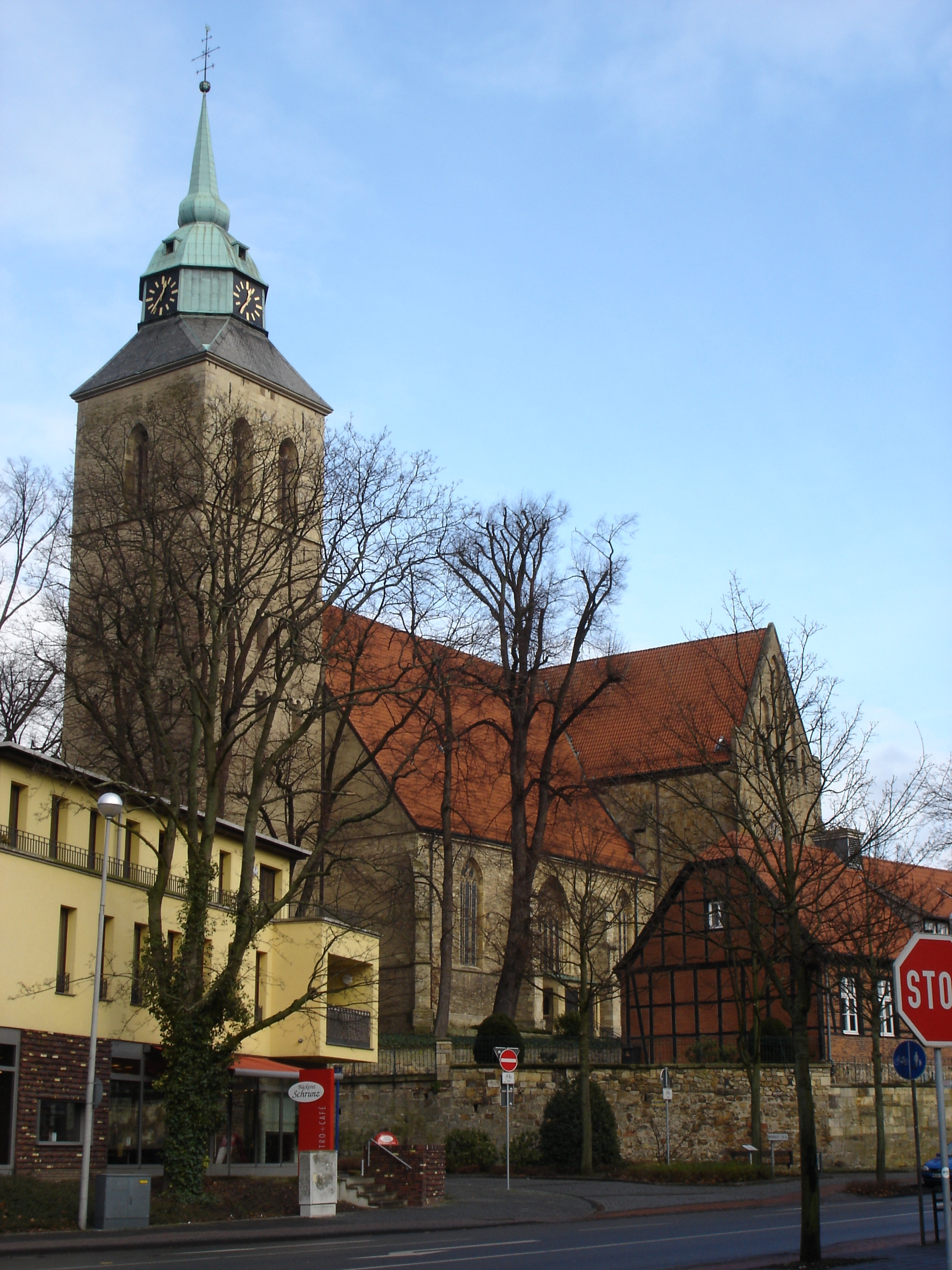 St. Martinus in Greven, Nordrhein-Westfalen